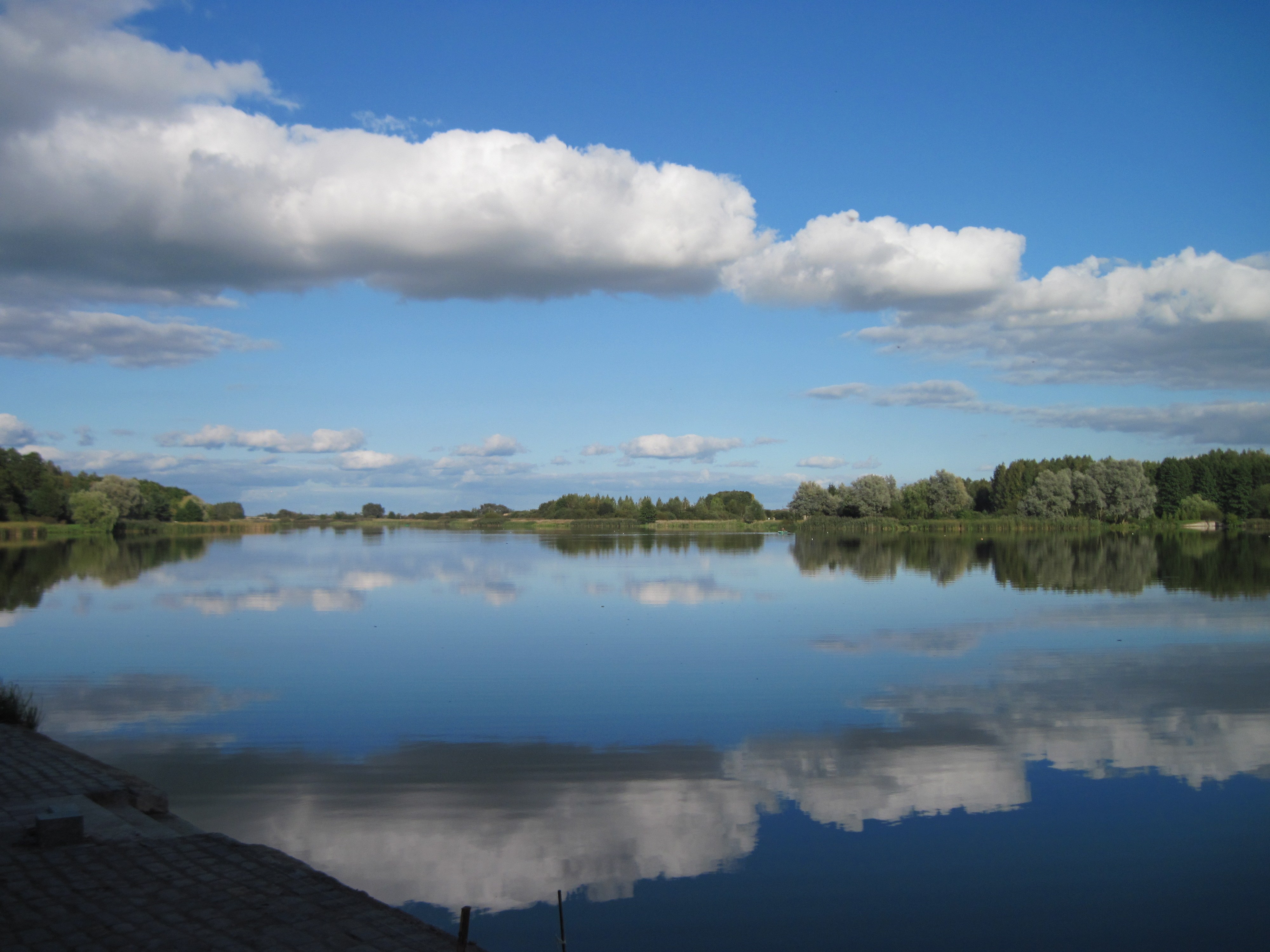 Зажалка Дзікая ў Нясвіжскім палацава-паркавым комплексе